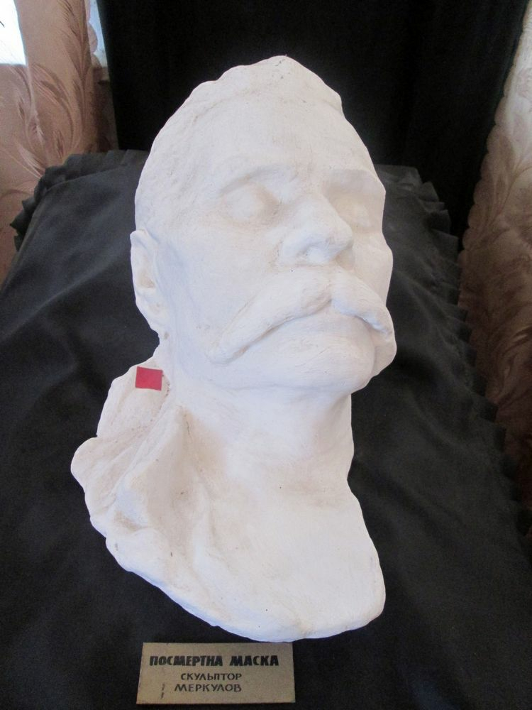 Посмертна маска Максима Горького роботи С. Д. Меркурова (1881-1952) з колекції Мануйлівського літературно-меморіального музею Максима Горького, зал №5 (с. Верхня Мануйлівка, Козельщинський район, Полтавська область, Україна)